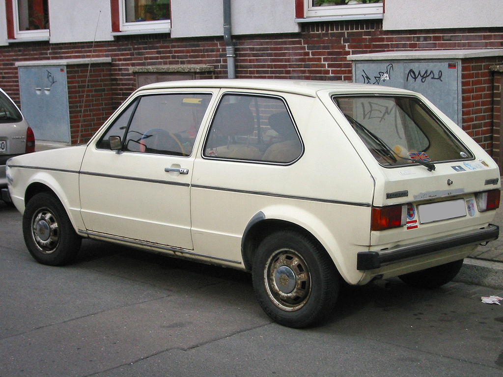 VW Golf 1